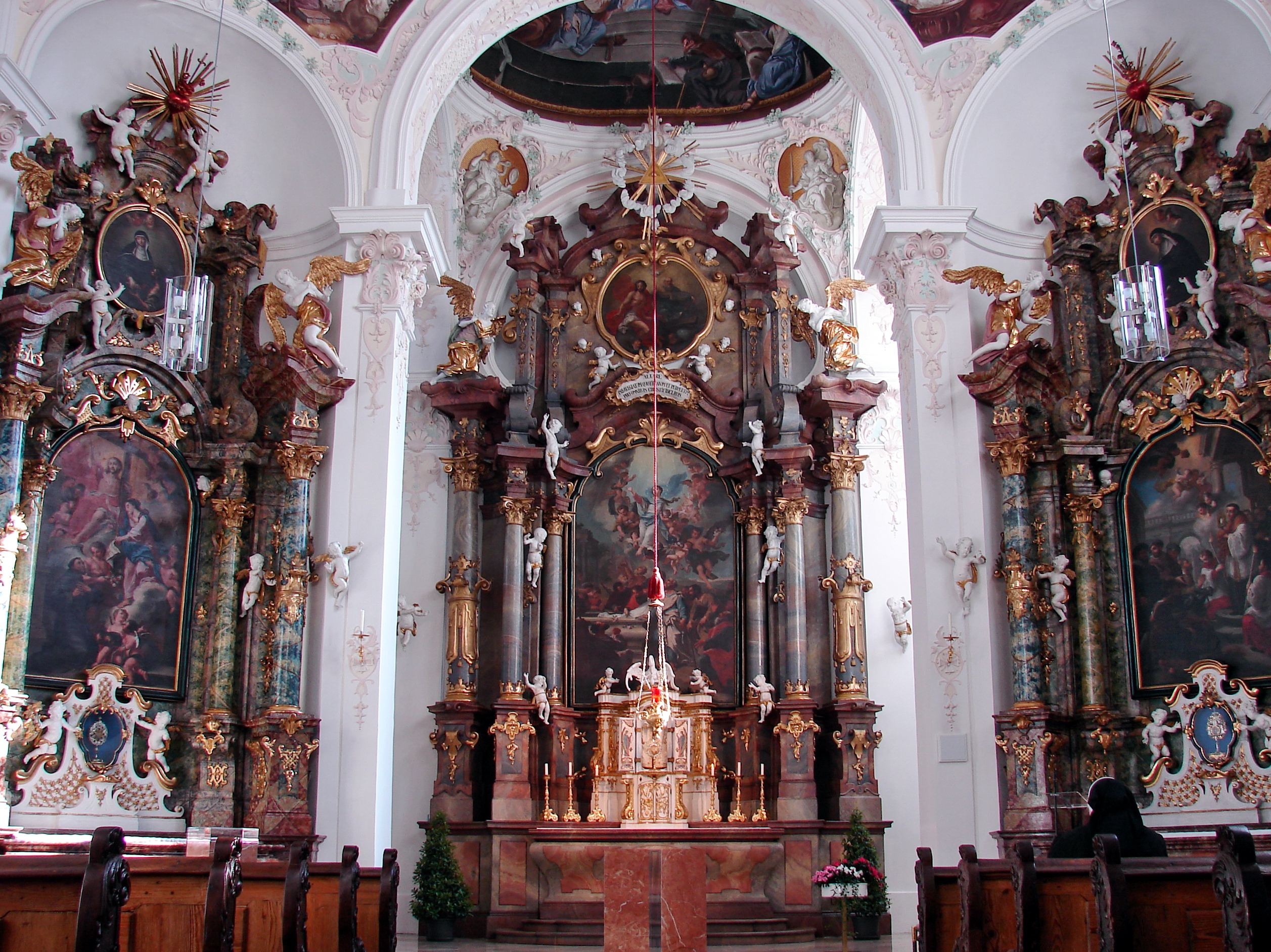 Die Klosterkirche Mariä Himmelfahrt ist die Kirche des Mutterhauses der Dillinger Franziskanerinnen in Dillingen an der Donau im bayerischen Regierungsbezirk Schwaben und gehört zur Diözese Augsburg.